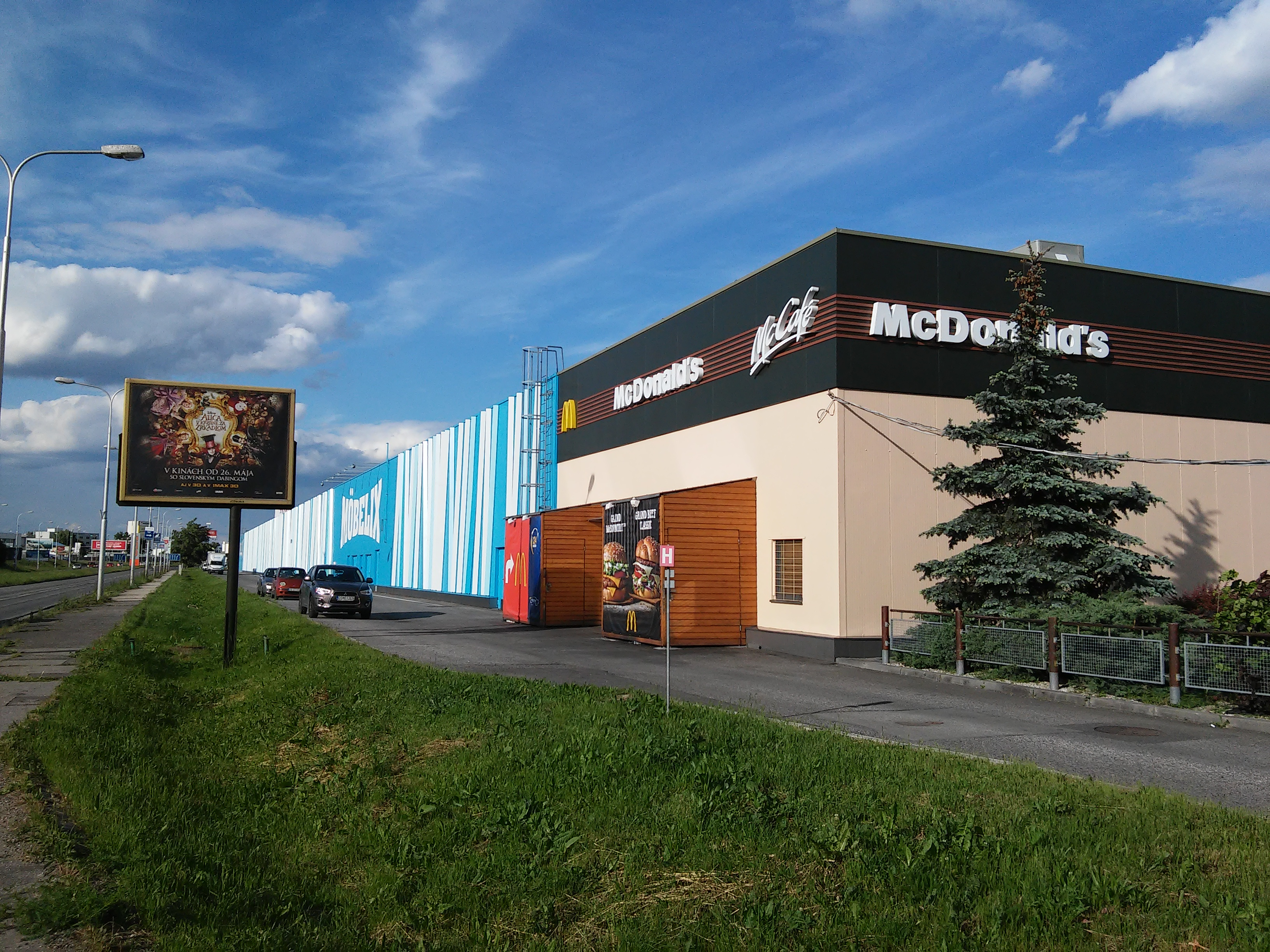 Shopping Park Soravia, Bratislava